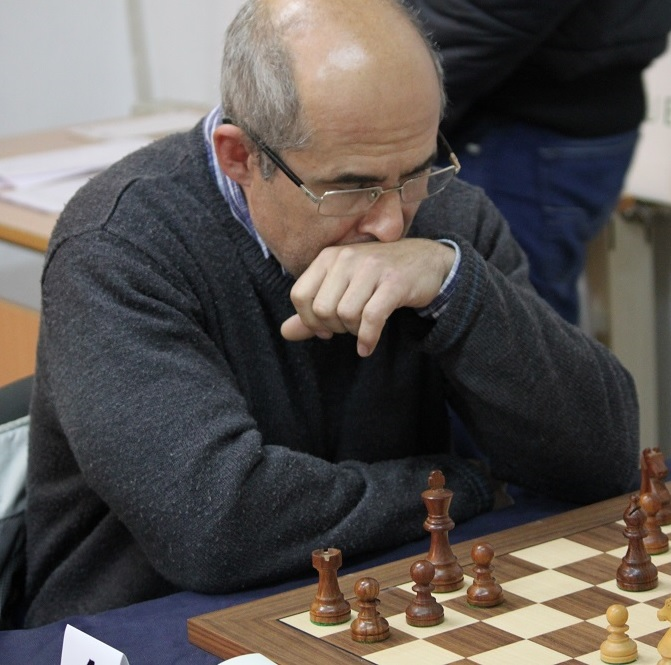 Antoni Gual jugant a Figueres amb l'equip del Club Escacs Cerdanyola